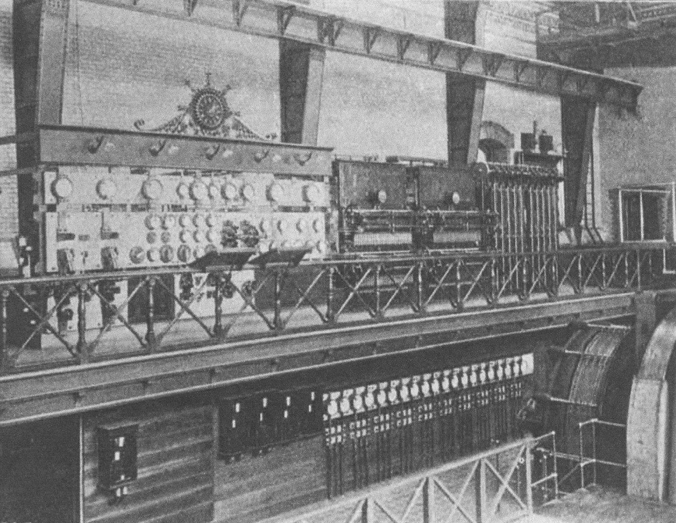 Brunkebergsverket i Stockholm, instrumenttavlan